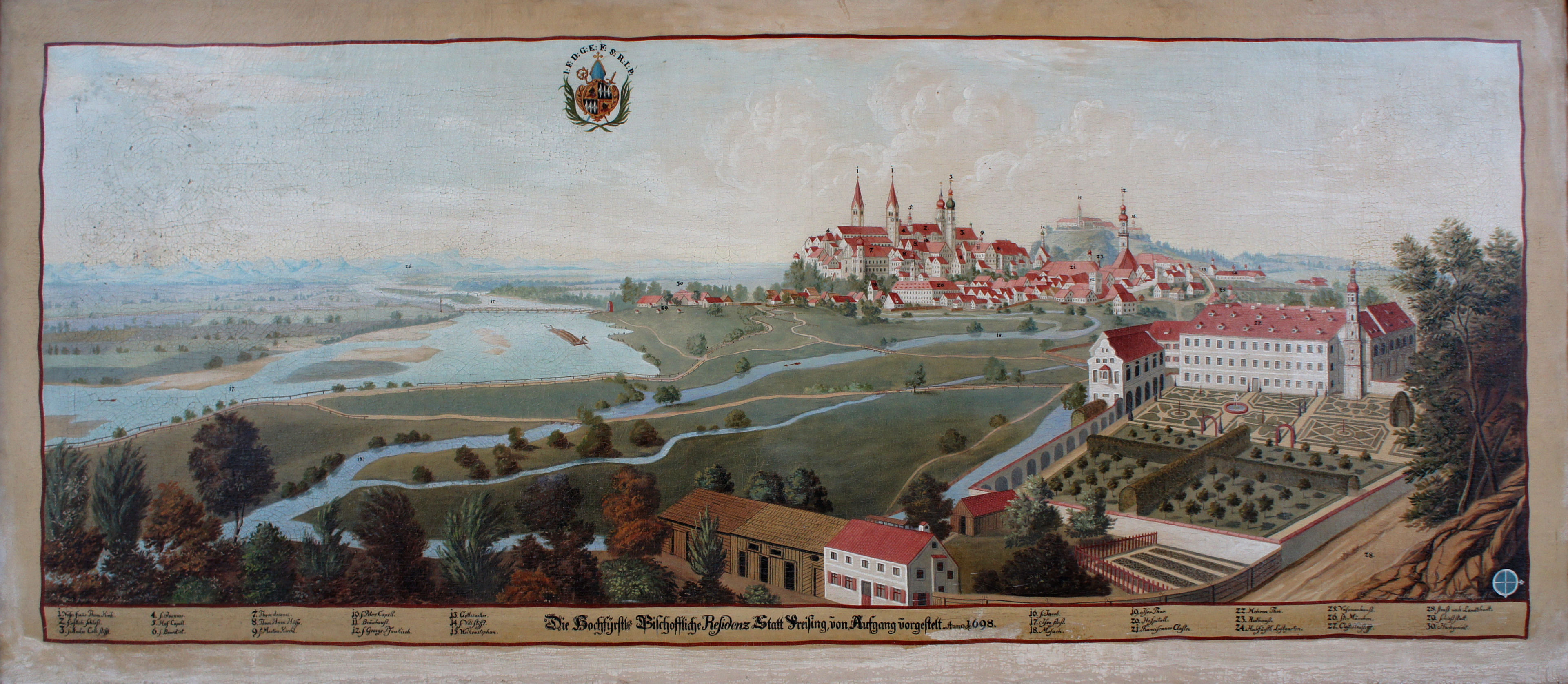 Gemälde aus einer Serie mit Darstellungen von Besitztümern des Hochstifts Freising im Fürstengang zwischen Fürstbischöflicher Residenz und Freisinger Dom.